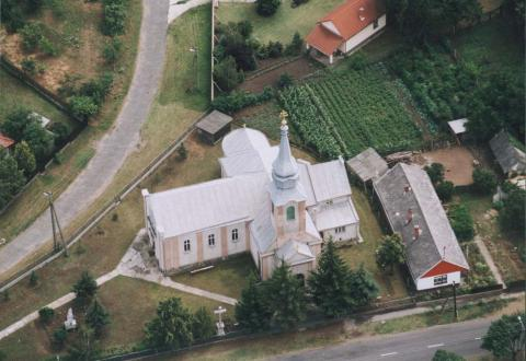 Nyírábrány Hungary aerialphotography, Szent Mihály főangyal görög katolikus templom